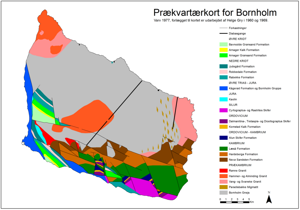 Geologisk kort over Bornholm, udgivet af tidsskriftet Varv 1977